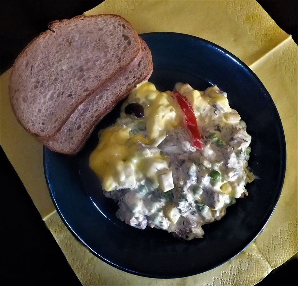 Salată de boeuf (Rindfleisch, Kartoffeln, Karotten, Erbsen, Salzdillgurken, Dill, Petersilie, schw. Pfeffer, Mayonnaise)